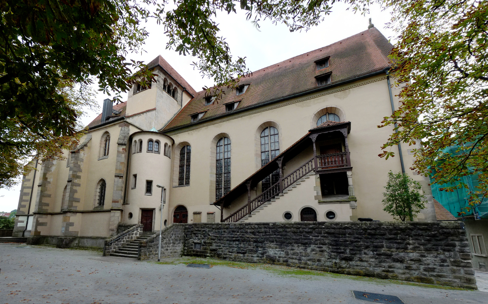 Backnang - Stiftskirche - Gesamtsicht hinten